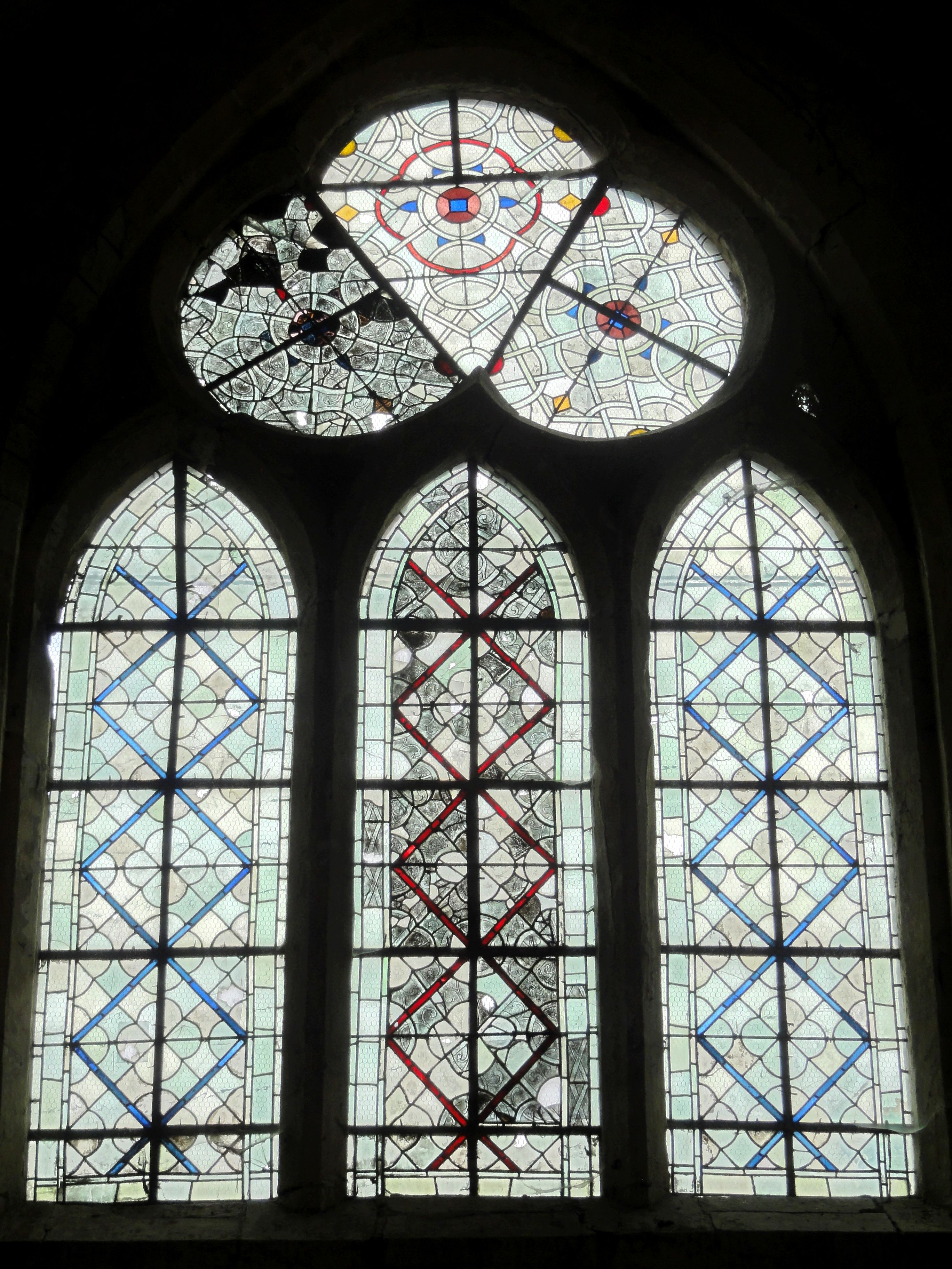 Chœur, fenêtre côté nord avec vitraux de grisaille d'origine.